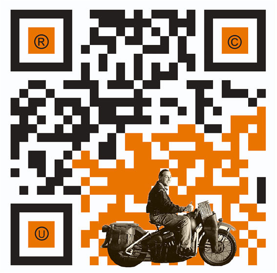 QR Code Pop Art Studie mit Farbe Grafik Foto, QR code zu einer URL Muster Farb Grafik Foto